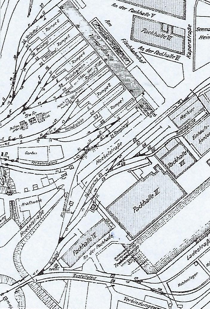 Gleisplan des Geestemünder Fischversandbahnhofs im Fischereihafen